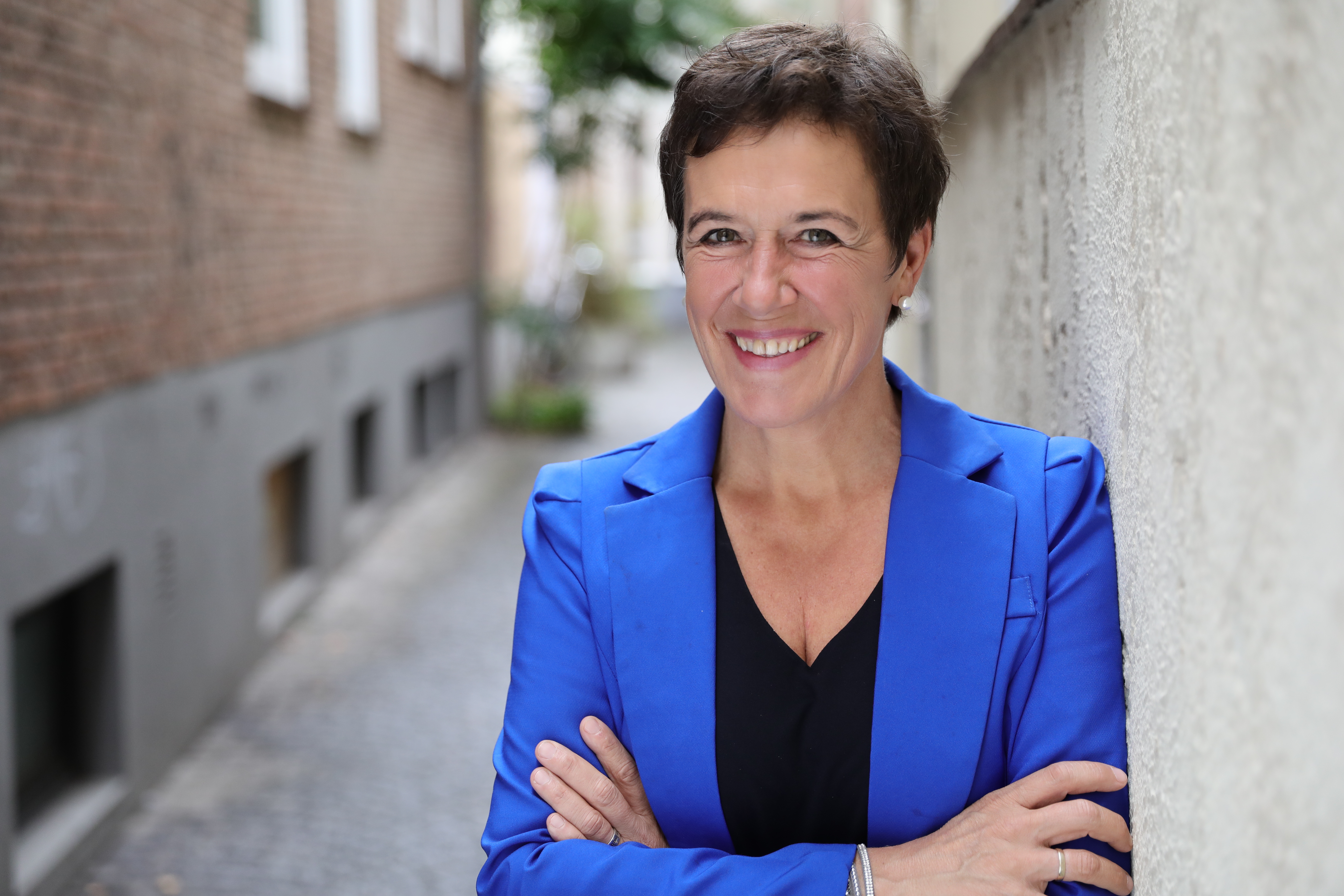 Ein Birgit Bergmann zwischen einem Haus und einer Wand.